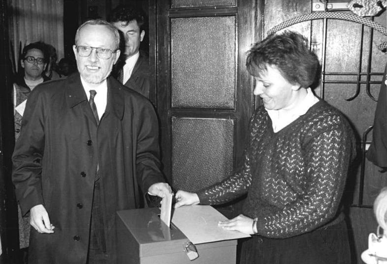 Berlin, Bundestagswahl, Lothar de Maiziere ADN Klaus Franke 14 2.12.90 Berlin: Wahlen. Der stellvertretende Vorsitzende der CDU, Lothar de Maiziere, bei der Stimmabgabe in seinem Wahllokal im Berliner Stadtbezirk Treptow. Abgebildete Personen: Maizière, Lothar de: Bundesminister für besondere Aufgaben, Ministerpräsident, CDU, DDR (GND 119020556)